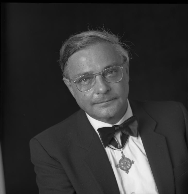 Professor Dr. Ingenieur Werner Reichardt, Mitglied des Ordens Pour le merité für Wissenschaften und Künste.